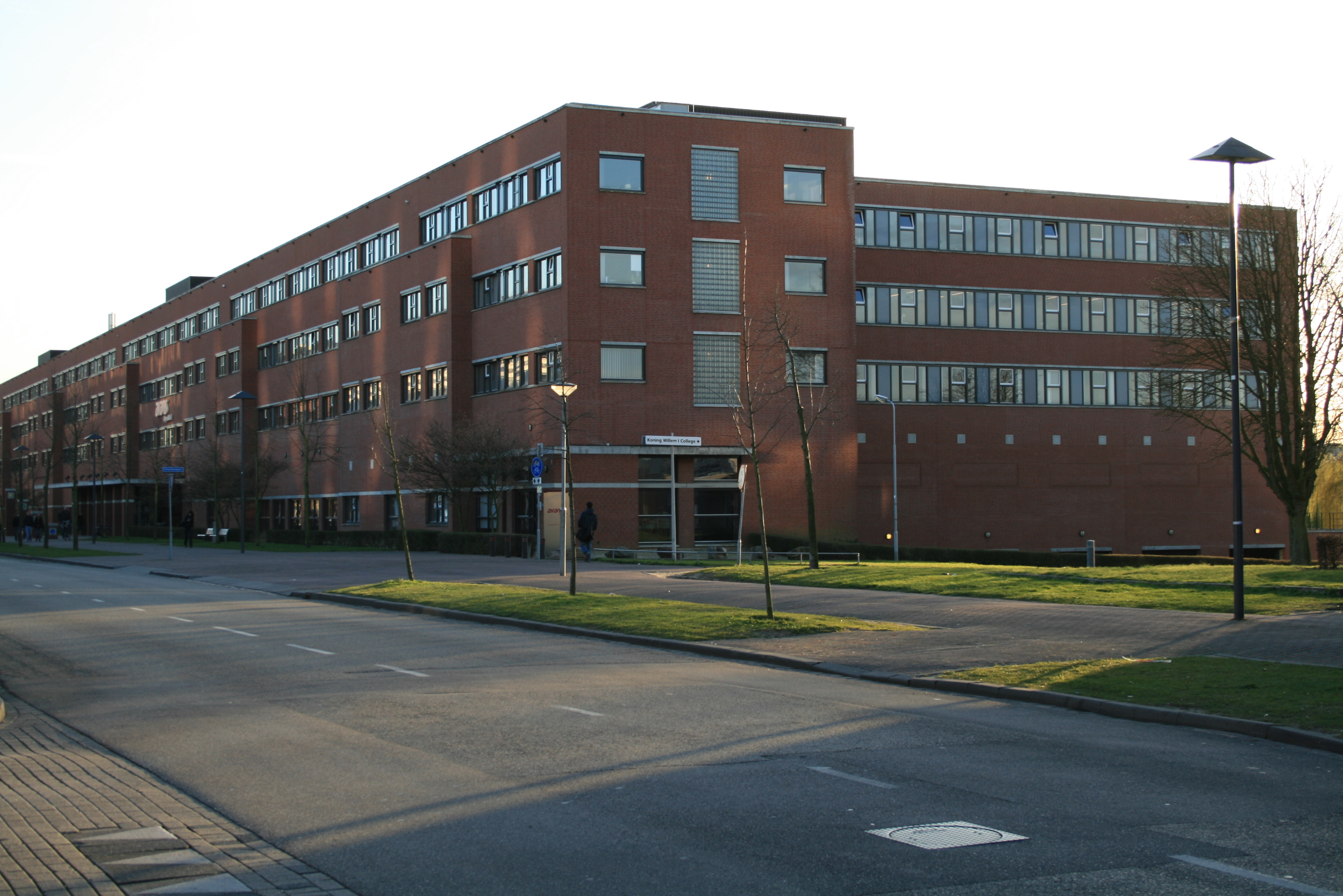 Zicht op een deel van de Avans Hogeschool 's-Hertogenbosch, Onderwijsboulevard 215, 5223 DE 's-Hertogenbosch